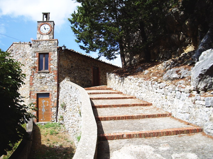 Scala dei Templari (salita alla Rocca aldobrandesca) Rocchette di Fazio (GR)